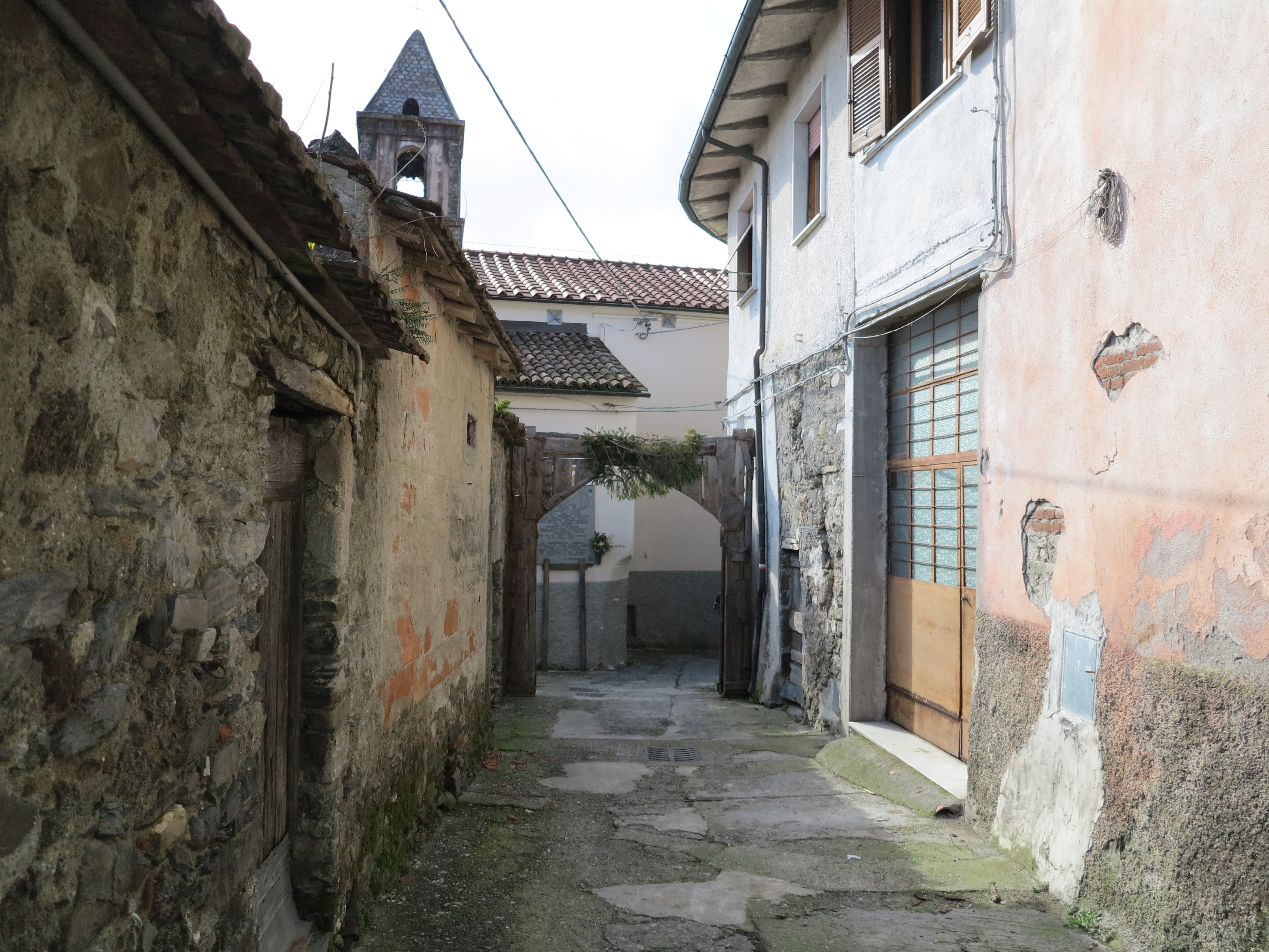 Vecchietto (Aulla)